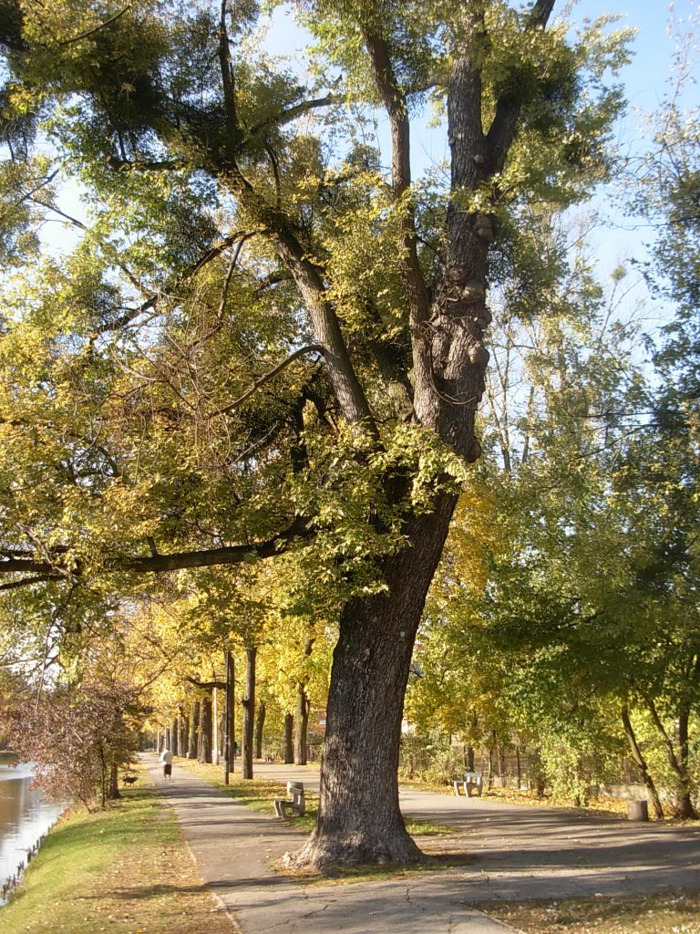 Planty nad Kanałem Bydgoskim. Topola Wilhelma